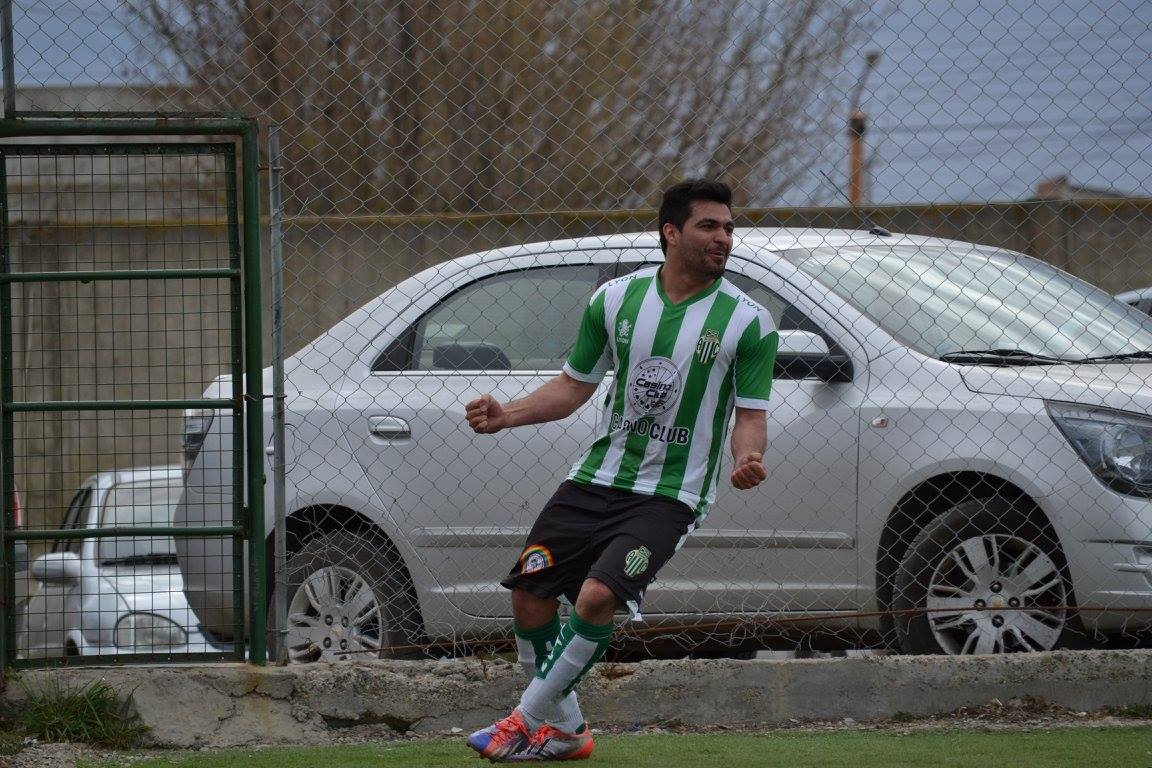 Mariano Matus Goleador Histórico del Boxing Club